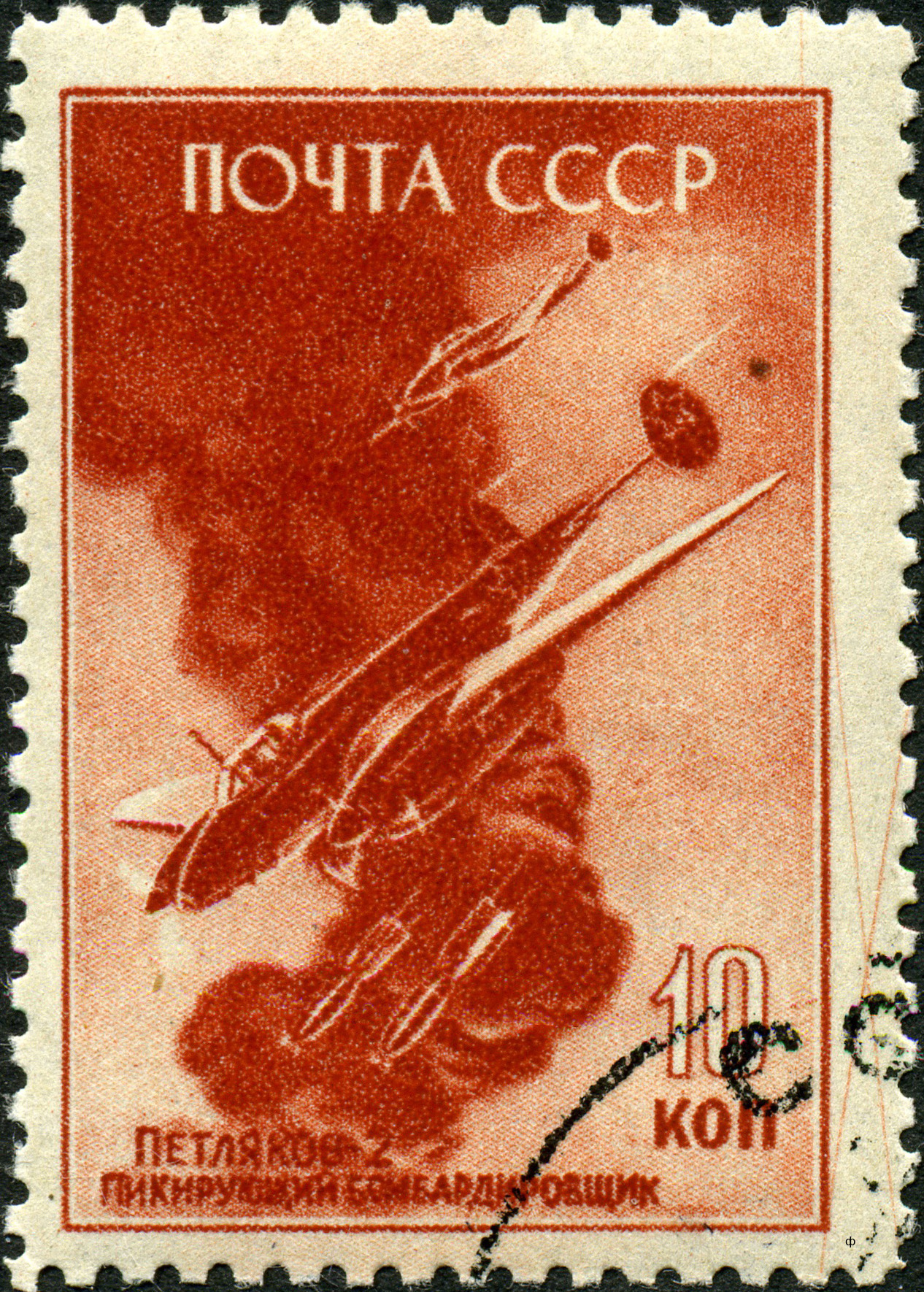 Марка СССР. Перецвечена, слишком большие яркость и контрастность.